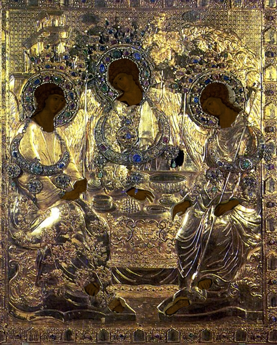 Троица Рублева в окладе. Коллаж из репродукции "Троицы Рублева" (PD-art) + фото оклада